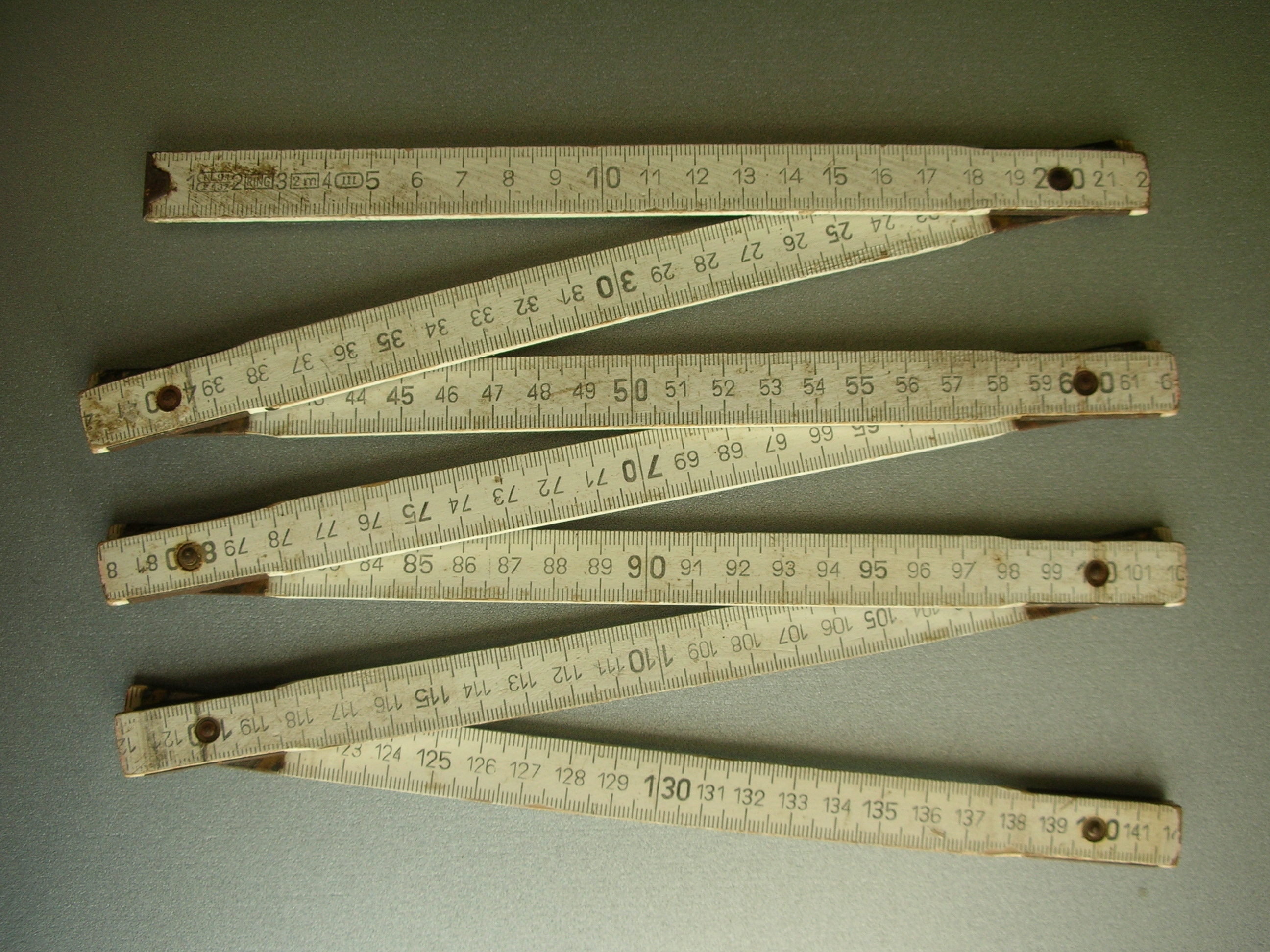 Schmiege (Gliedermassstab)